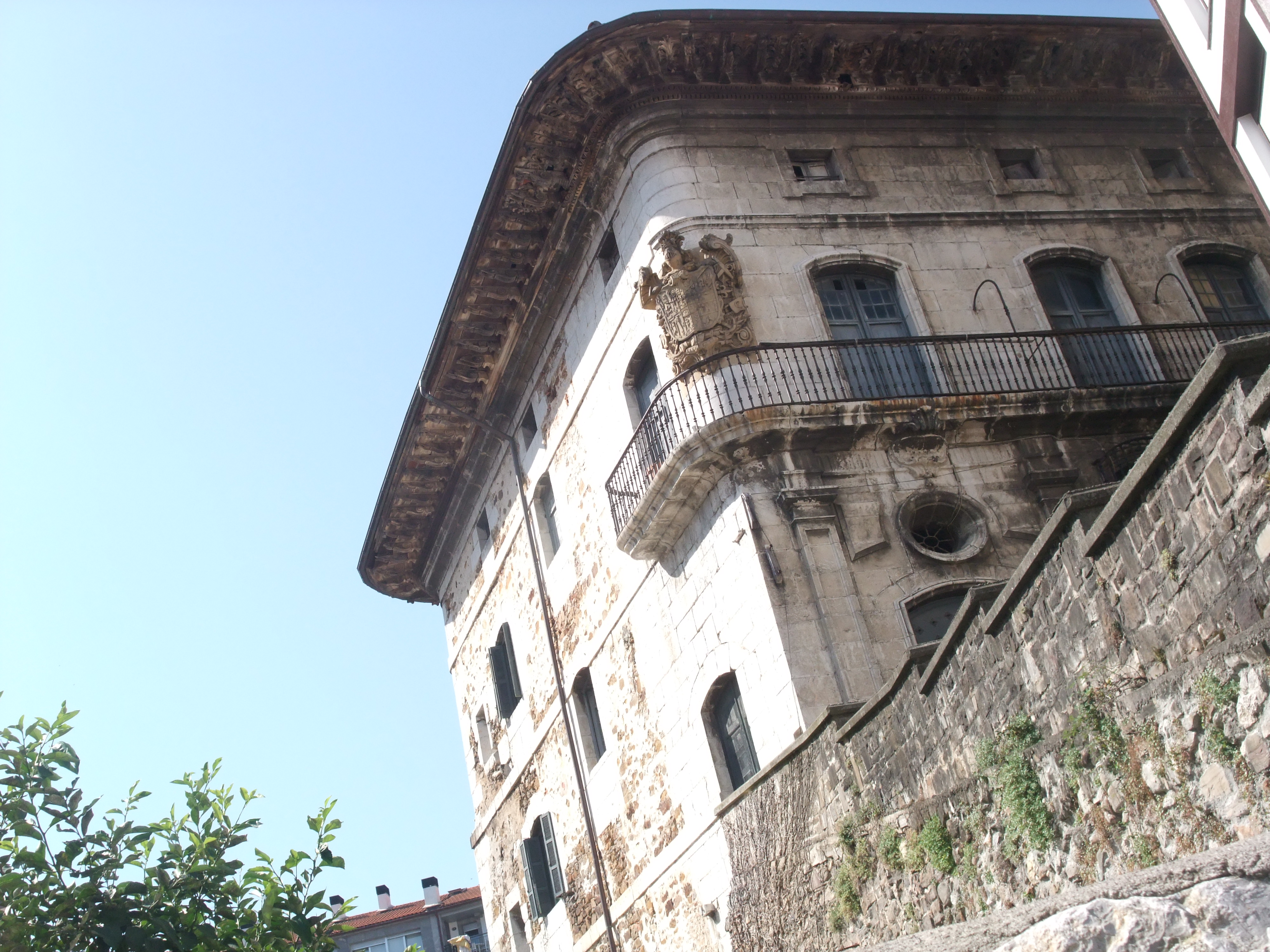 Mutriku (Guipúzcoa)-Palacio Montalibet-1